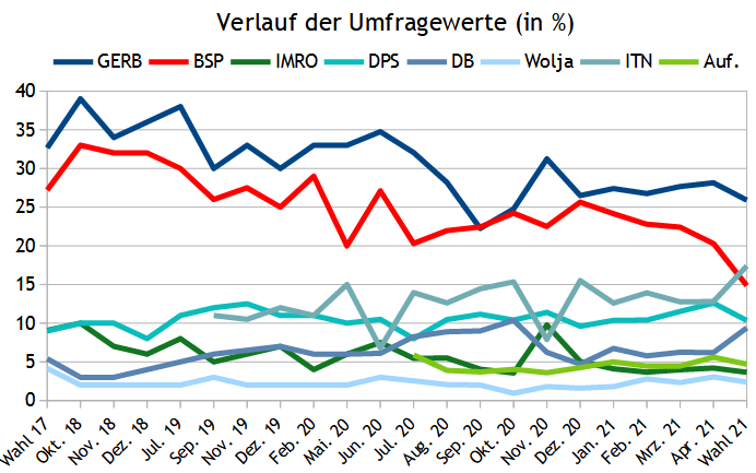 Umfragen zur Parlamentswahl in Bulgarien 2021